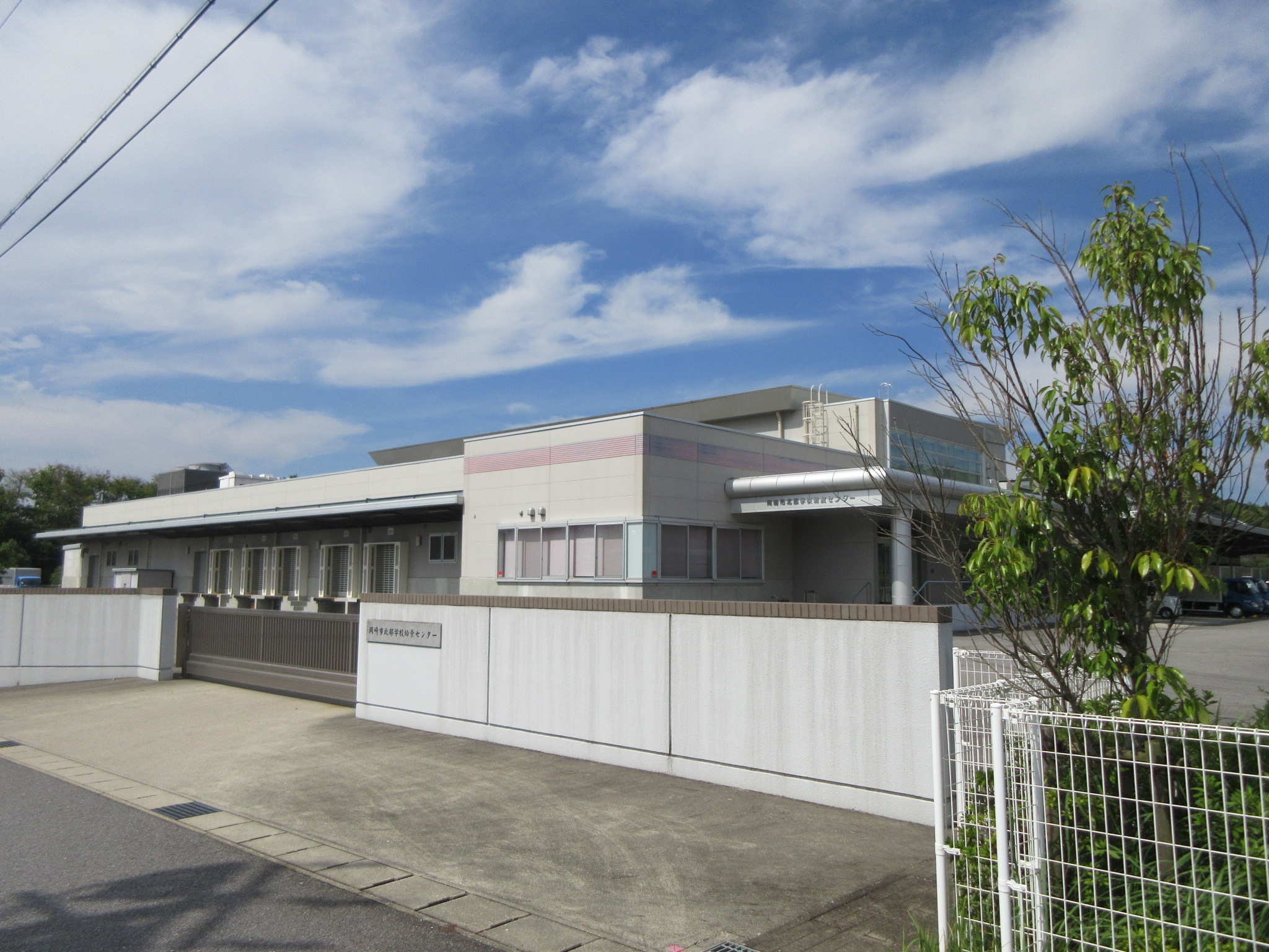 岡崎市北部学校給食センター（岡崎市東阿知和町）